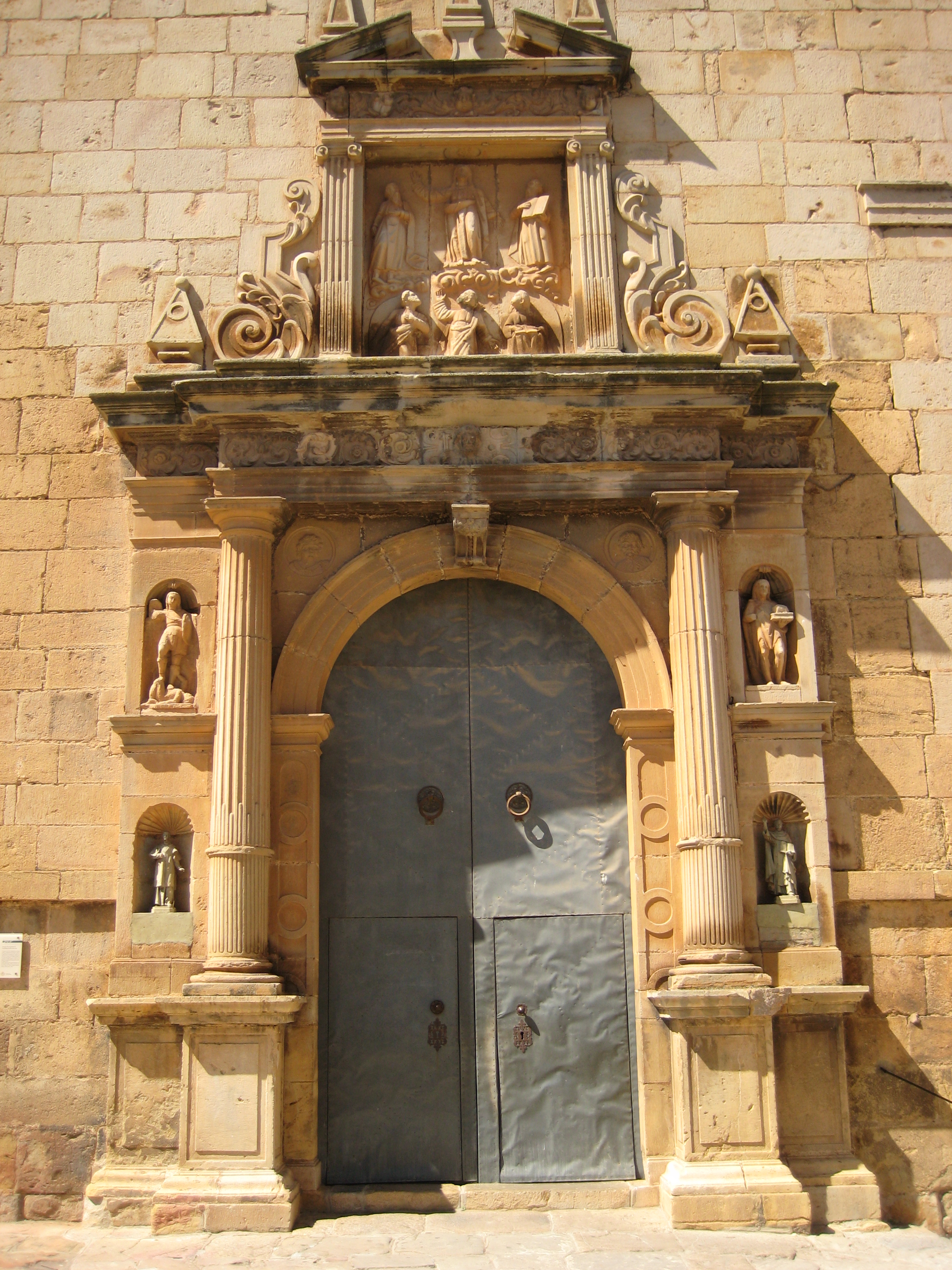 Portada principal de l'església de la Transfiguració del Senyor de les Useres (L'Alcalatén)